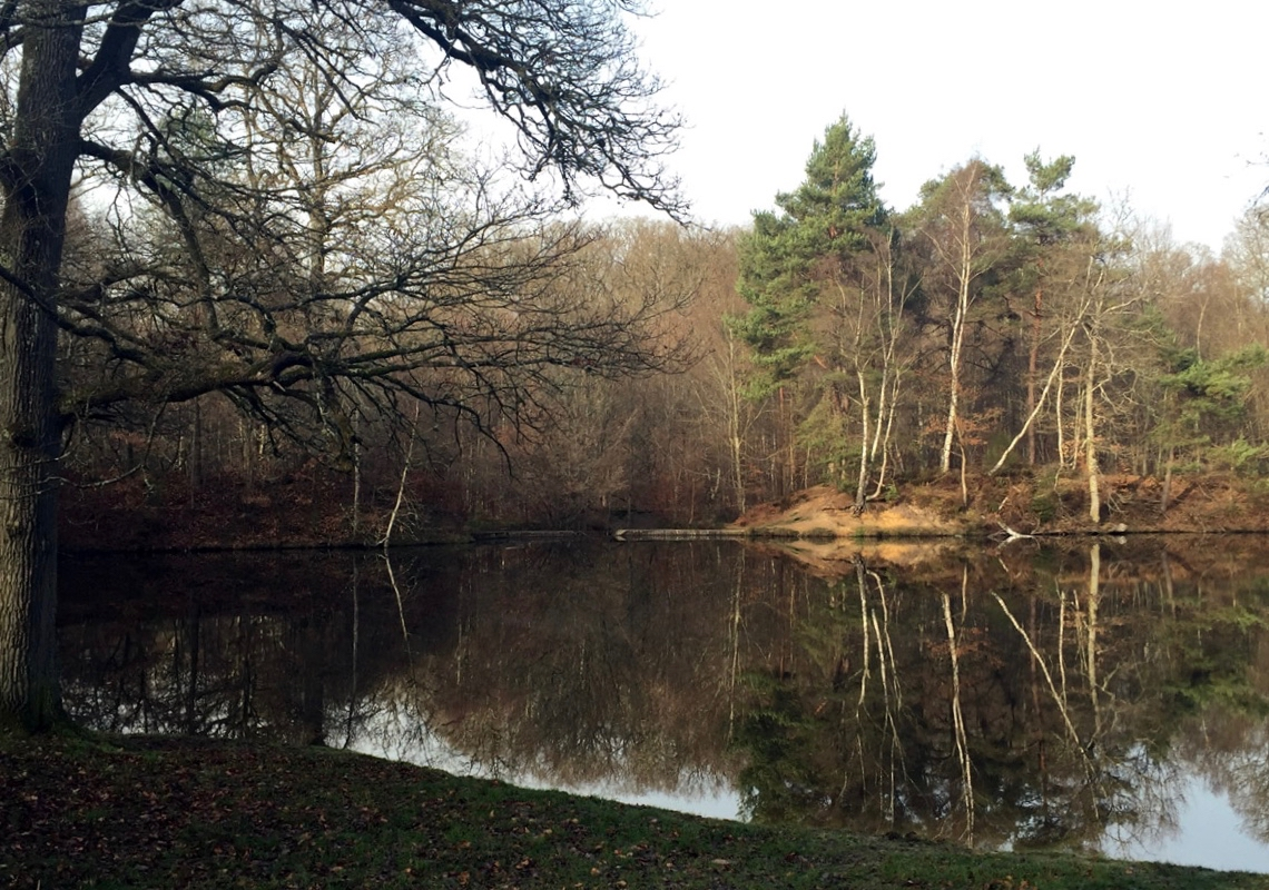 Etang Rompu (Yvelines)